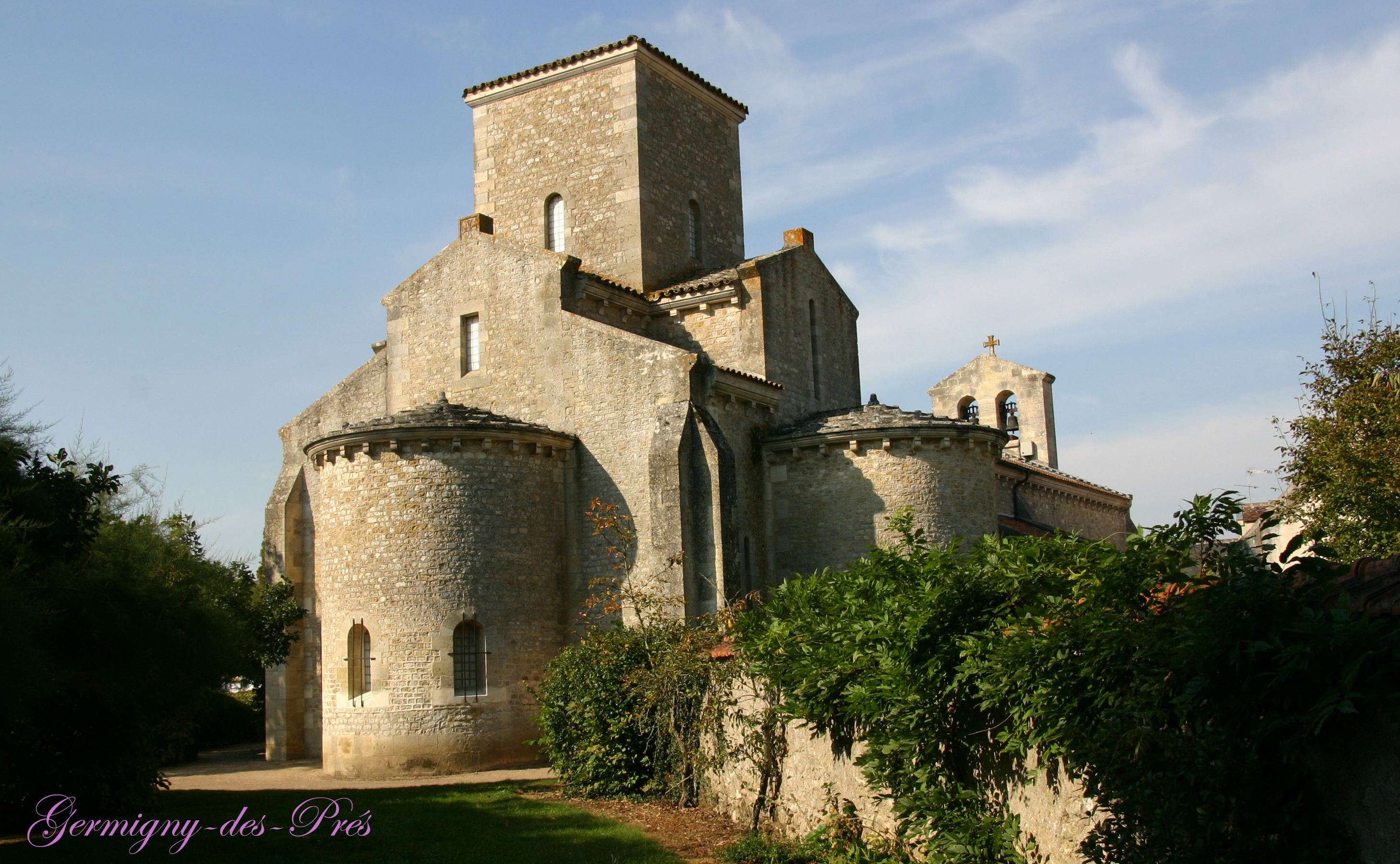 Kirche von Germigny-des-Prés im Loiret (Region Centre-Val de Loire).